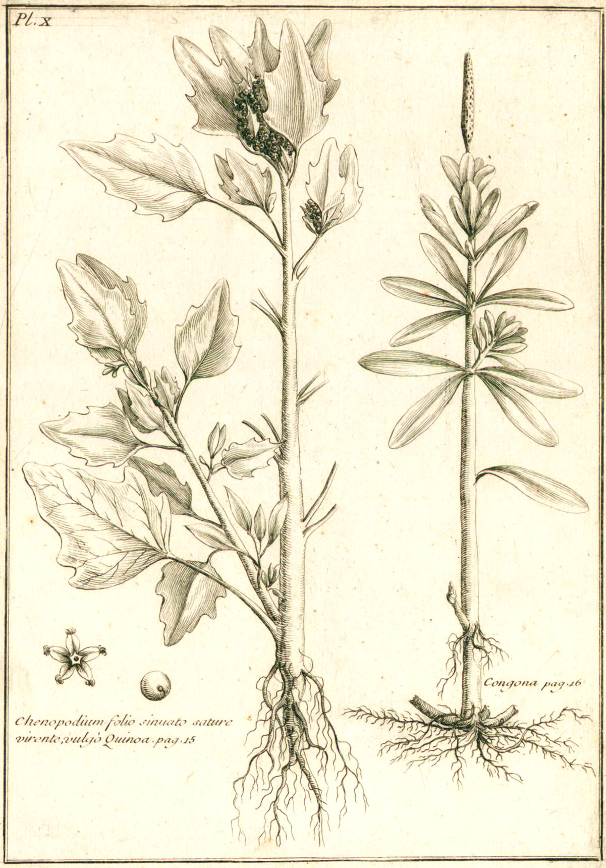 A gauche de la planche "Chenopodium Quinoa". In: "Journal des Observations Physiques, Mathematiques et Botaniques, faites par l'ordre du roy sur les côtes orientales de l'Amérique méridionale & aux Indes occidentales. Et dans un autre voyage fait par le même ordre à la Nouvelle Espagne & aux Isles de l'Amérique. (Paris-1725)" by Louis Feuillee, (1660-1732).